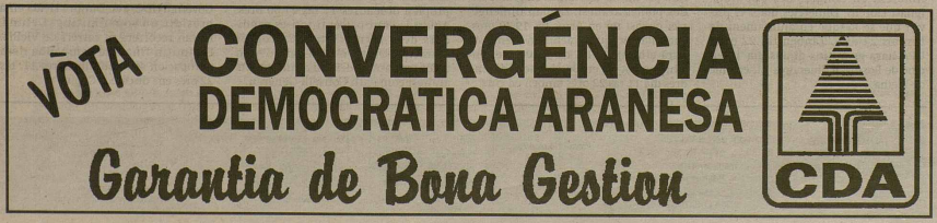 Anunci electoral de Convergència Democràtica Aranesa (CDA) per a les eleccions del 1999